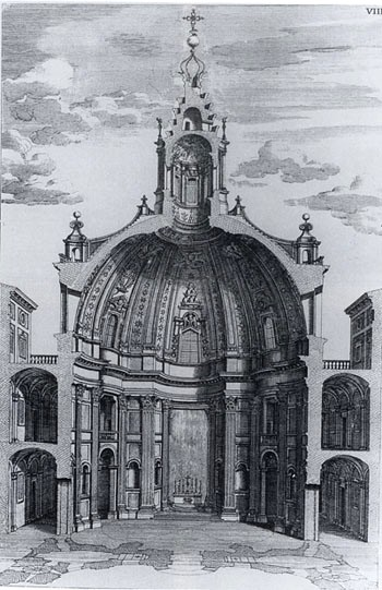 Francesco Borromini's church Sant' Ivo alla Sapienza in Rome.